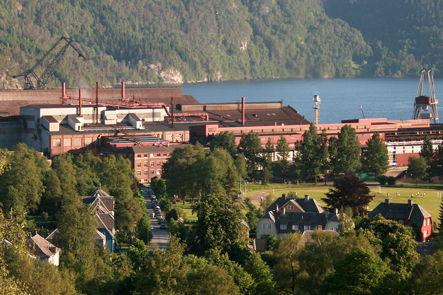 Smelteverket i Sauda.